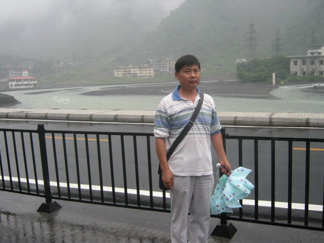 中文（中国大陆）: 徐亚灵老师在北川